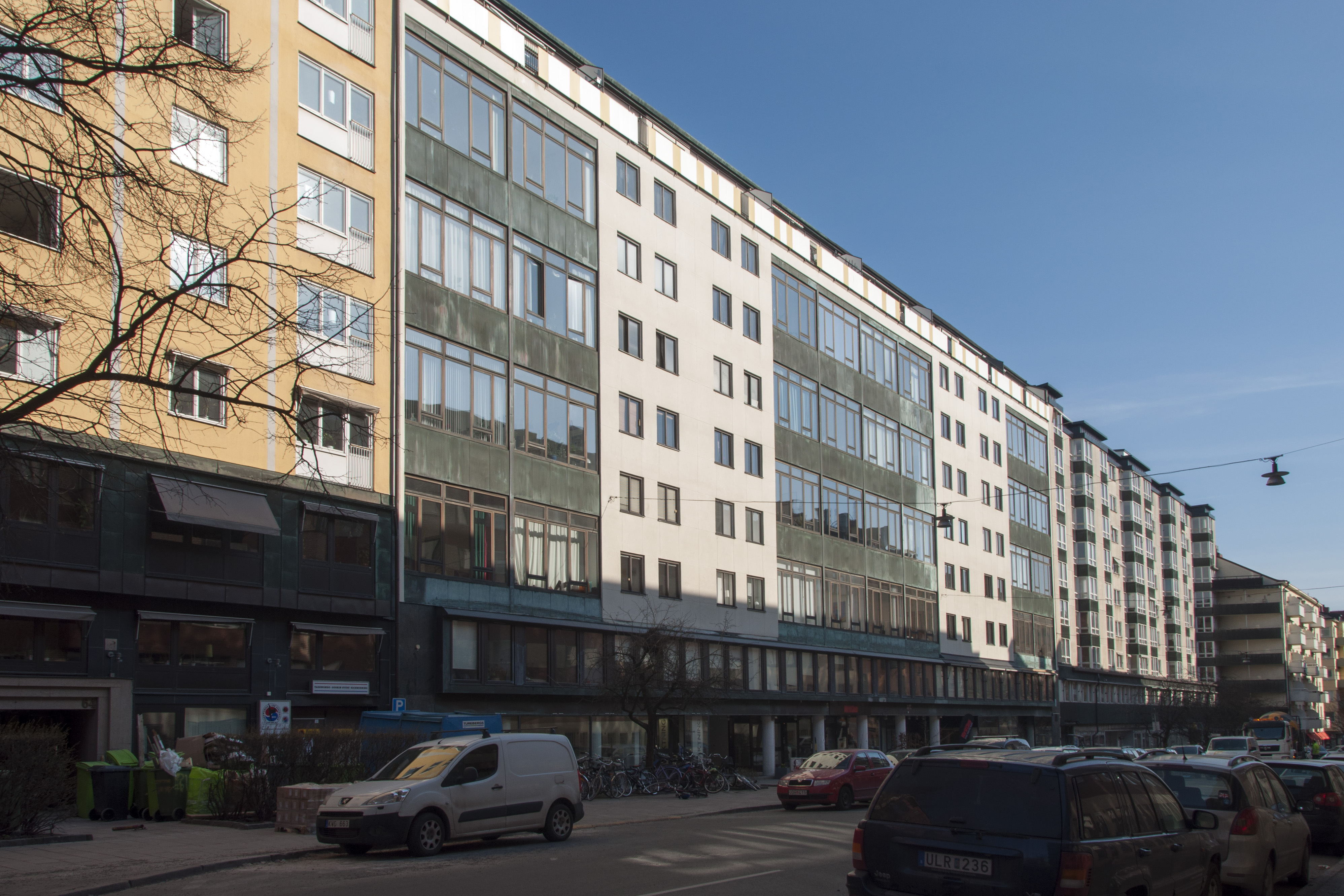 Geten 31,Döbelnsgatan 58-60, Nybyggnadsår 1960 - 1972, Byggnadsfirma Åke E. Ericson (Byggmästare) Axel Grönwall & Ernst Hirsch (Arkitekt) Livförsäkringsbolaget Svenska Järnvägsmännen